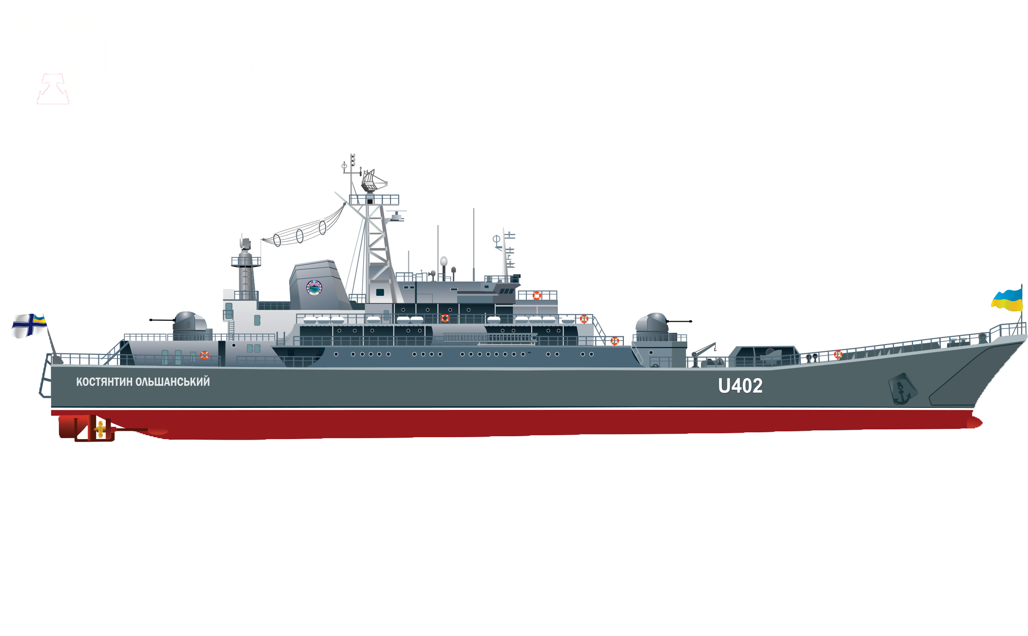 Костянтин Ольшанський — великий десантний корабель проекту 775. «Костянтин Ольшанський» є багатопалубним, плоскодонним десантним кораблем океанської зони з півбаком і розвиненою кормовою надбудовою. Названий на честь Героя Радянського Союзу, командира загону 68 десантників, які брали участь у вигнанні нацистських окупантів з Миколаєва в ході Другої світової війни — Костянтина Ольшанського.